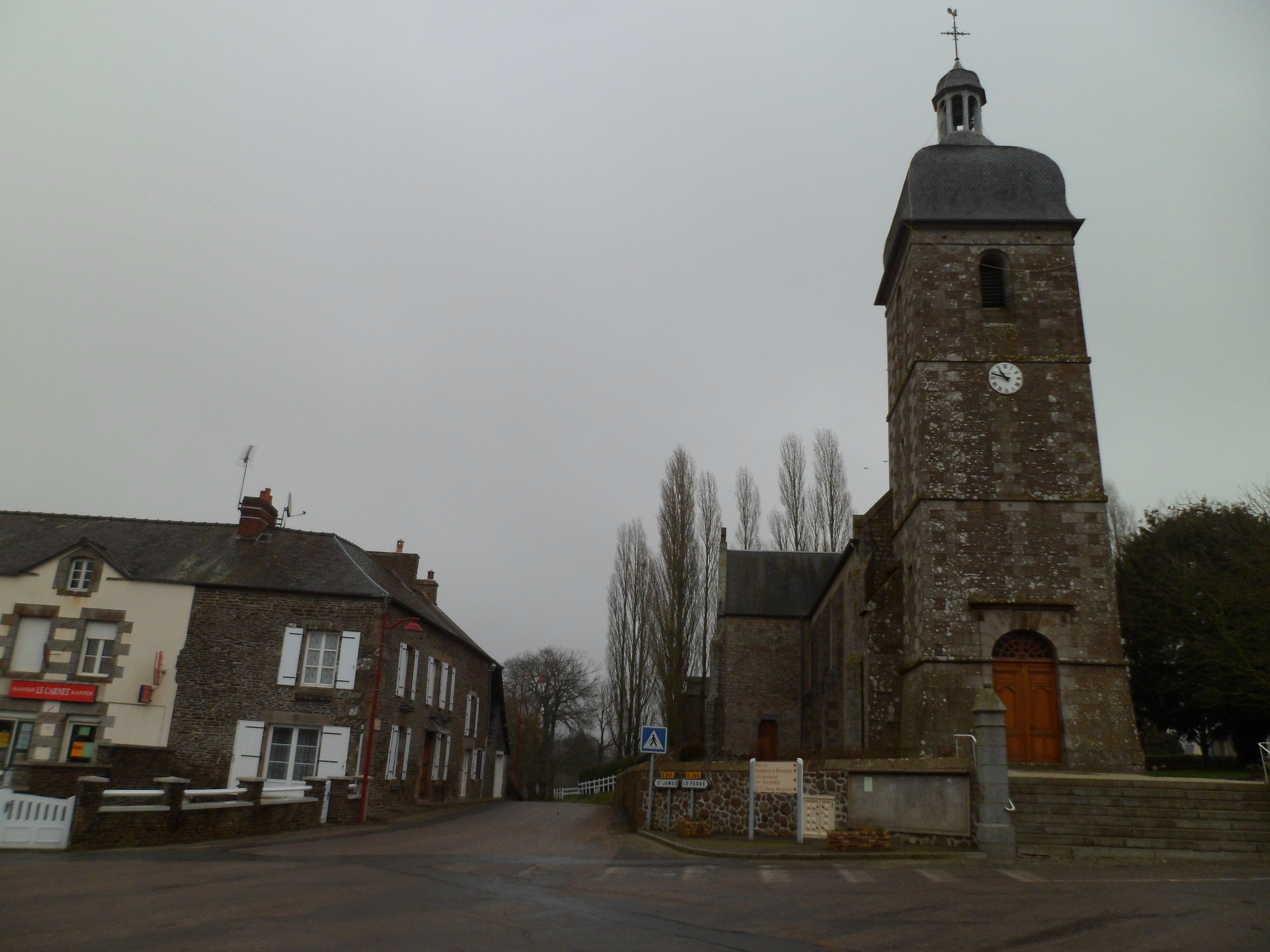 Carnet